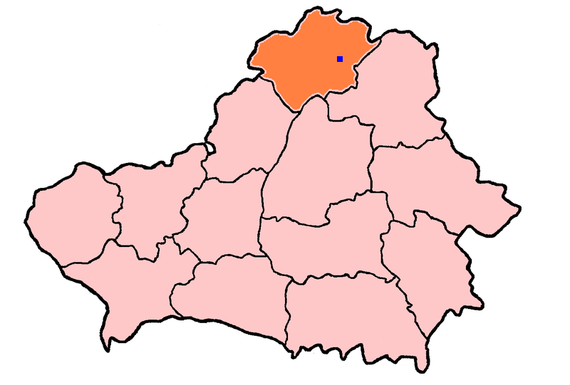 Polotsk Region (BSSR, 1944)